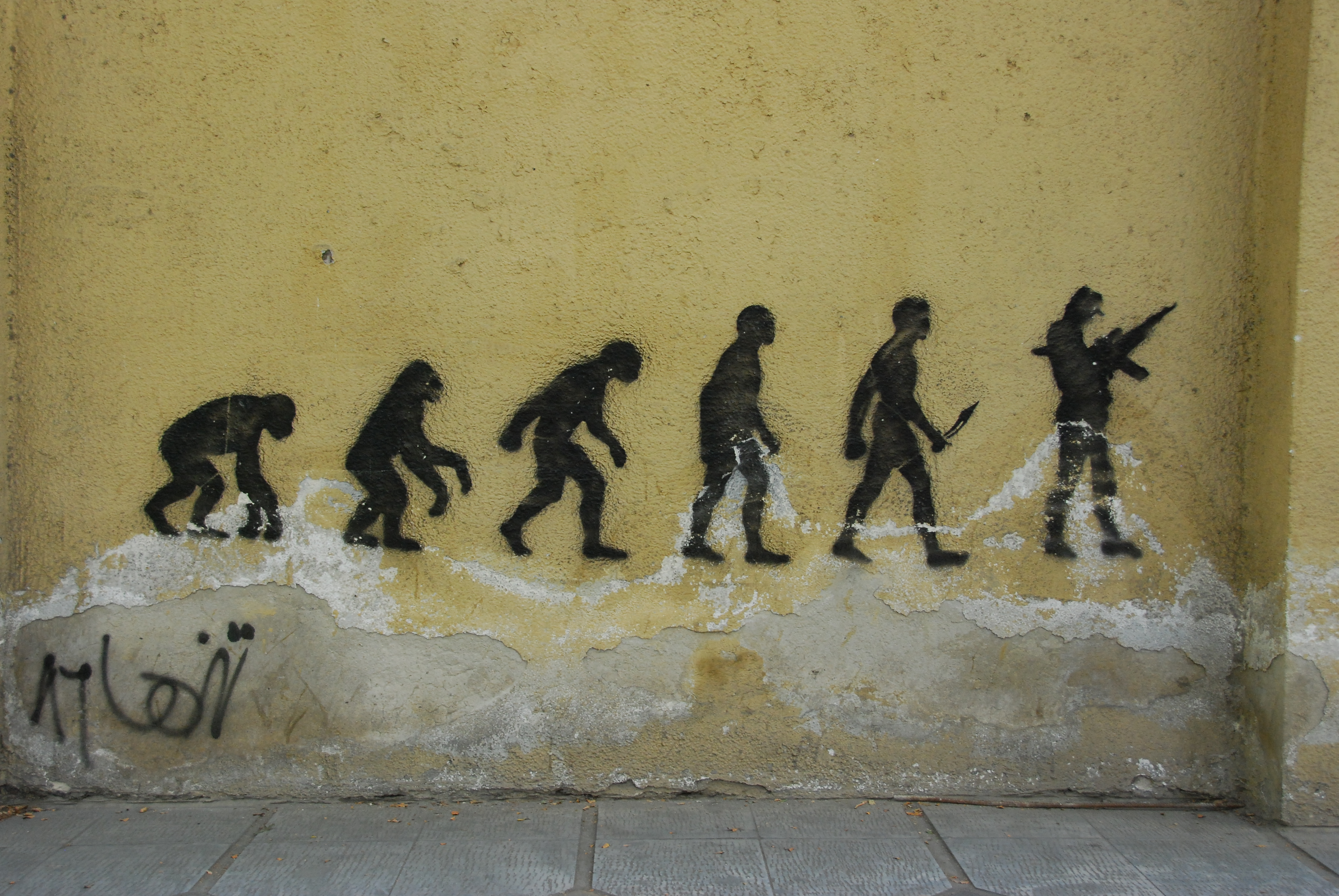 Vue d'artiste de l'évolution de l'Homme peinte sur un mur.